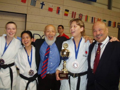 Foto zelf genomen op EK Konstanz, Duitsland 2006. Geen auteursrechten aan verbonden.